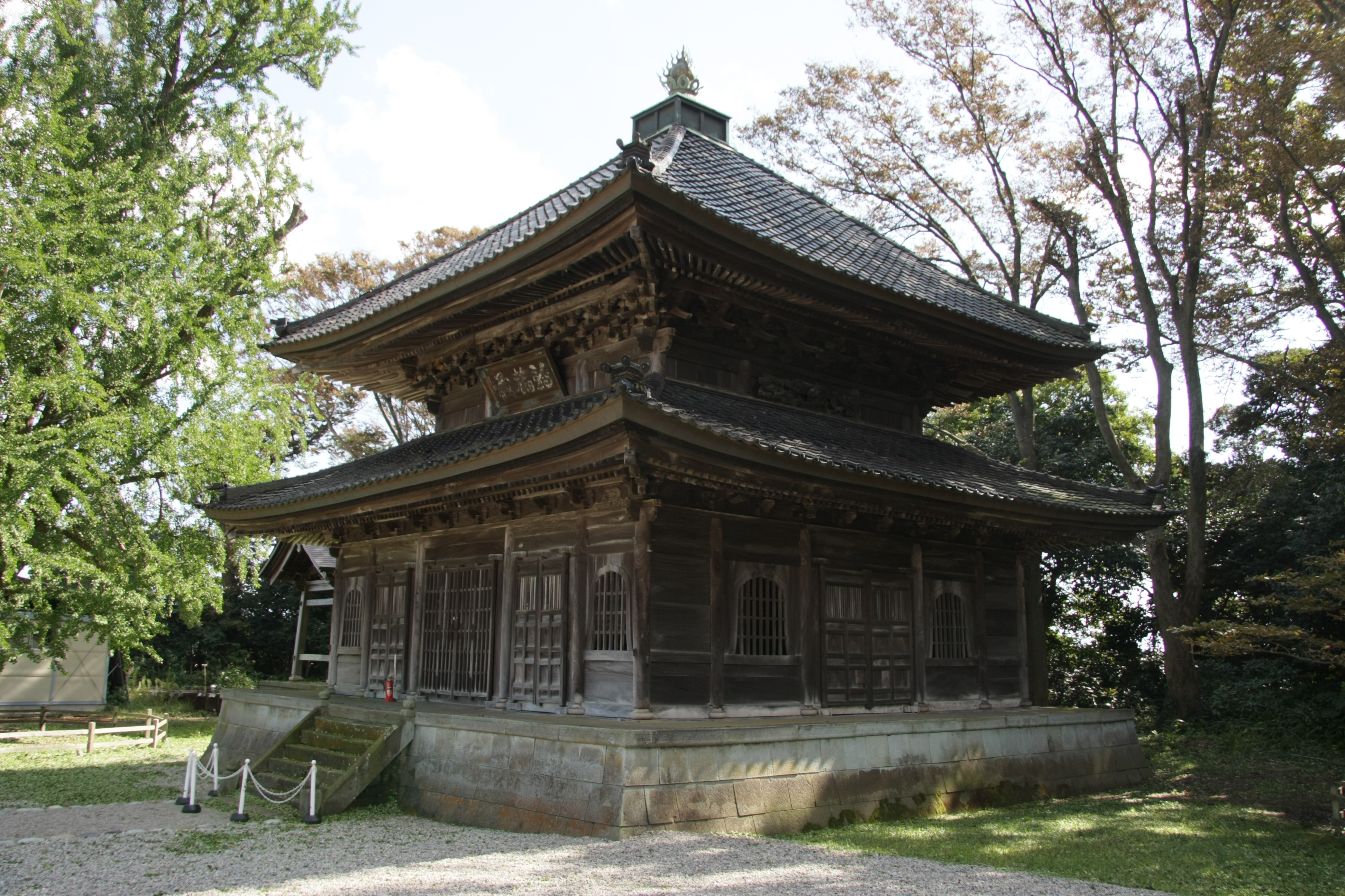 勝興寺の経蔵